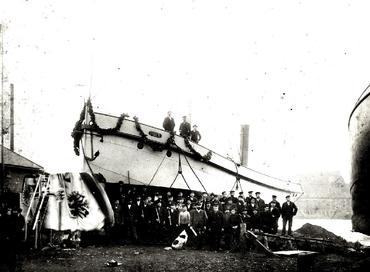 Stapellauf der Eider bei Johann Heinrich Fack